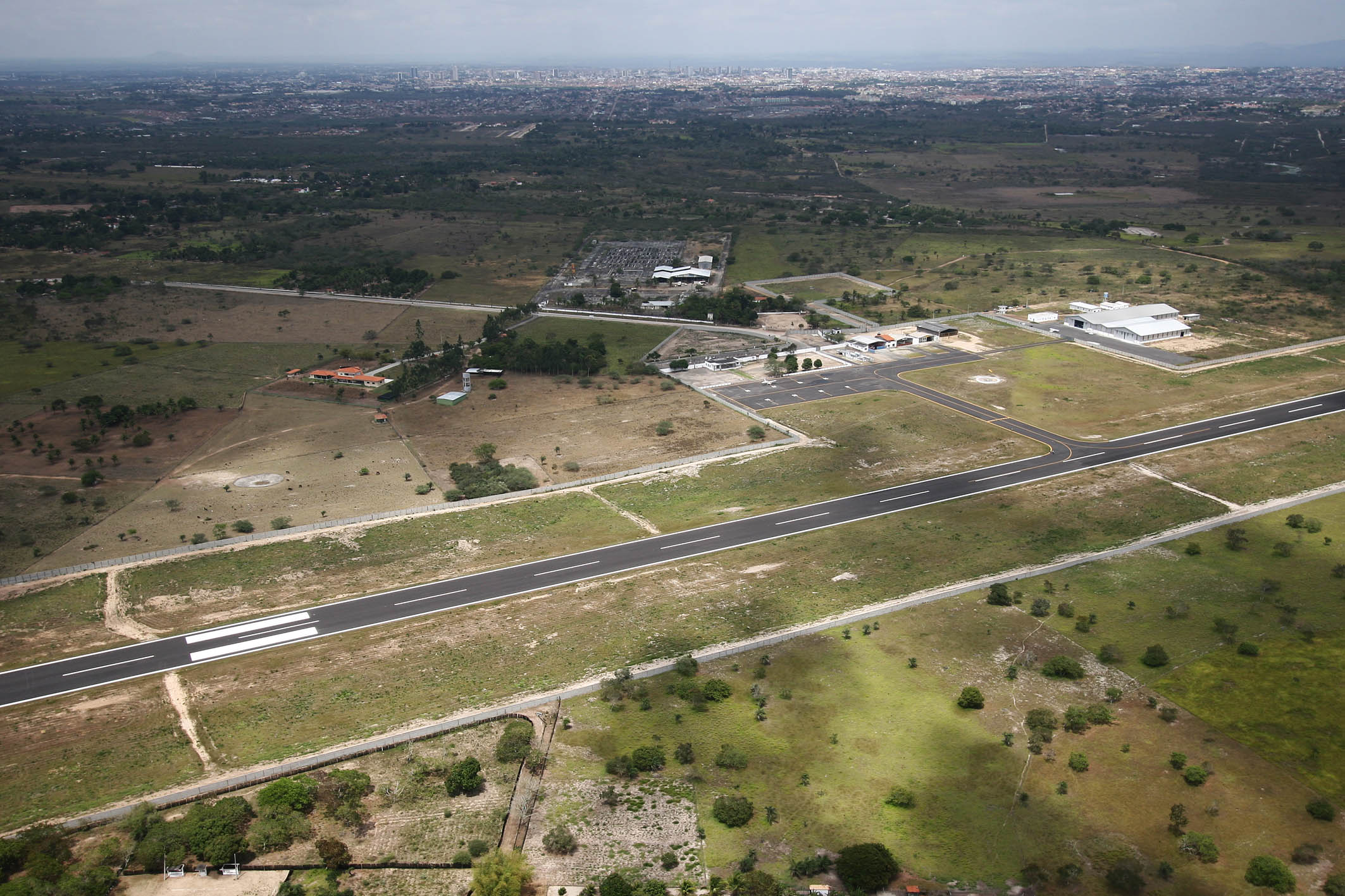 Reforma do aeroporto de Feira de Santana Foto: Carol Garcia / SECOM